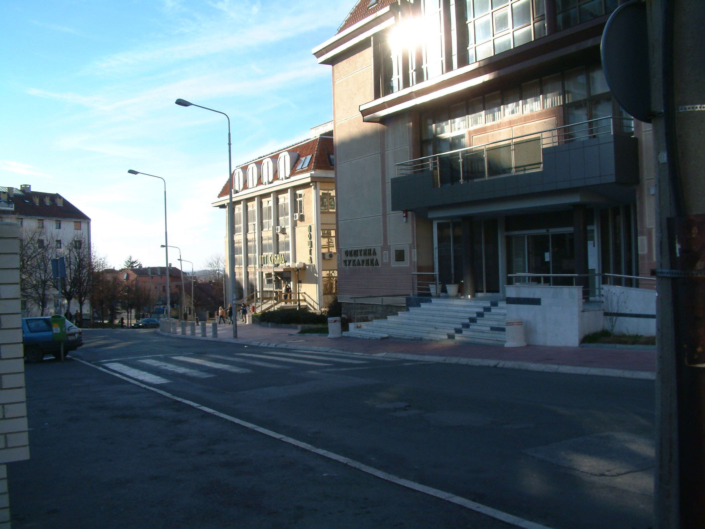 Зграда општине Чукарица, Београд